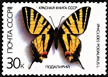 Почтовая марка СССР. Подалирий. Номер в каталоге ЦФА 5803